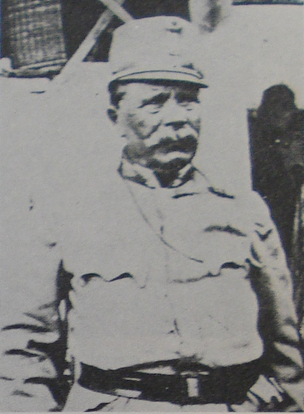 general Luka Šnjarić (1851.-1930.)